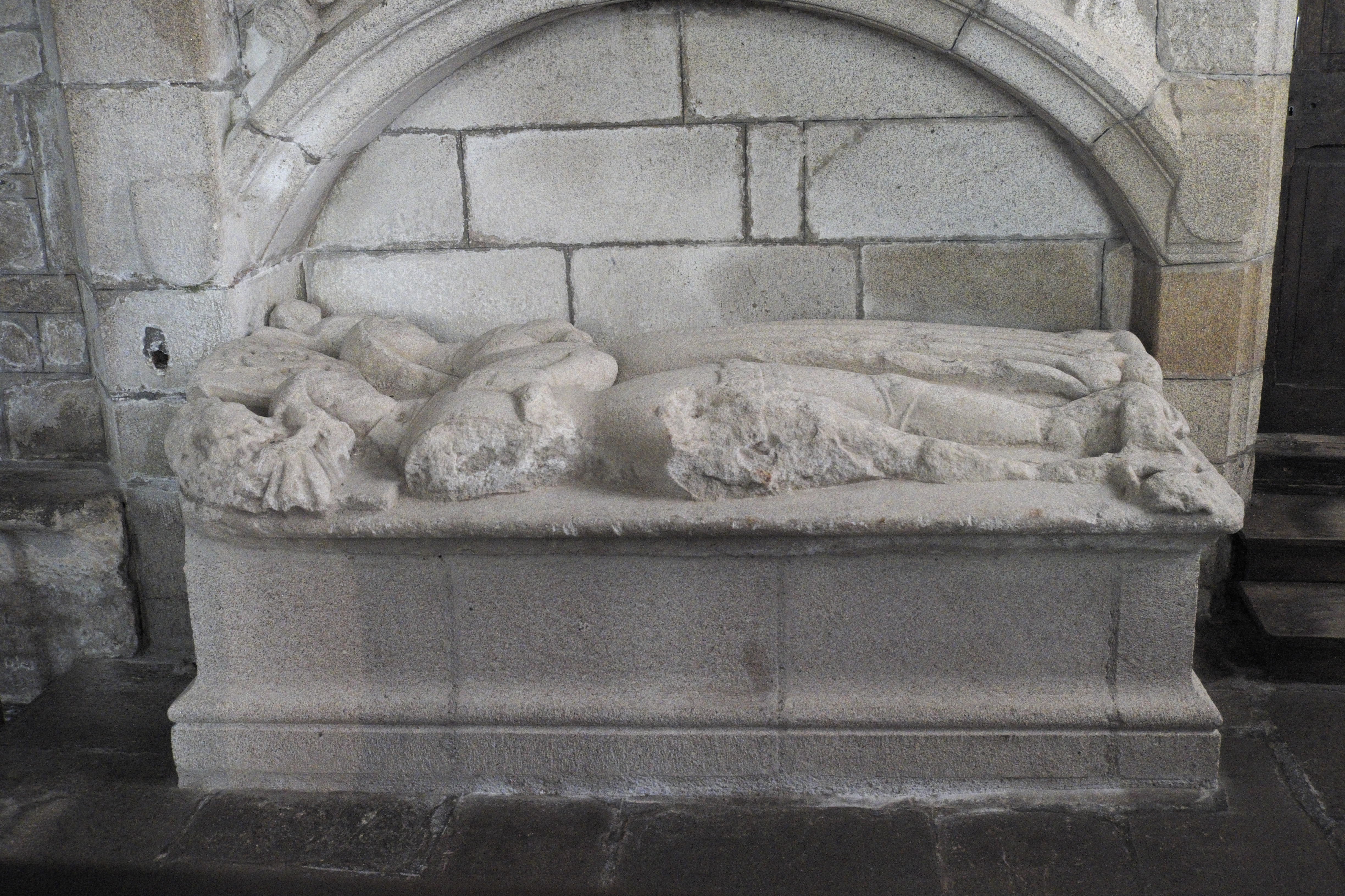 Katholische Kirche Saint-Fiacre in Guengat im Département Finistère (Region Bretagne/Frankreich), Grab von Jean de Saint-Alouarn und seiner Gemahlin Marie de Trégain, aus dem 16. Jahrhundert